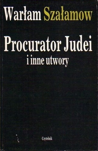 Варлам Шаламов. Прокуратор Иудеи и другие произведения, Czytelnik, 1991, Польша.